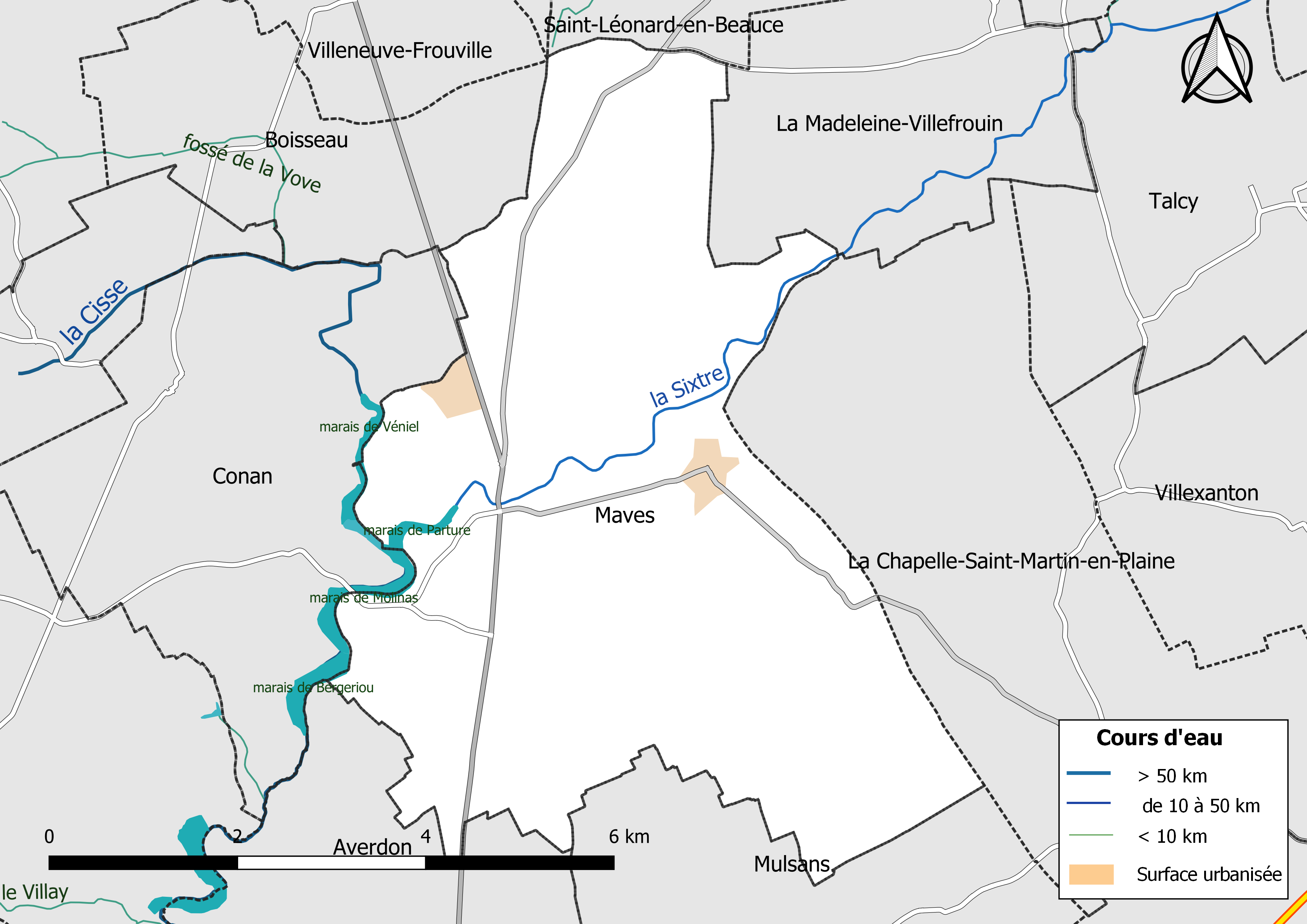 Carte du réseau hydrographique de la commune de Maves (Loir-et-Cher, France).